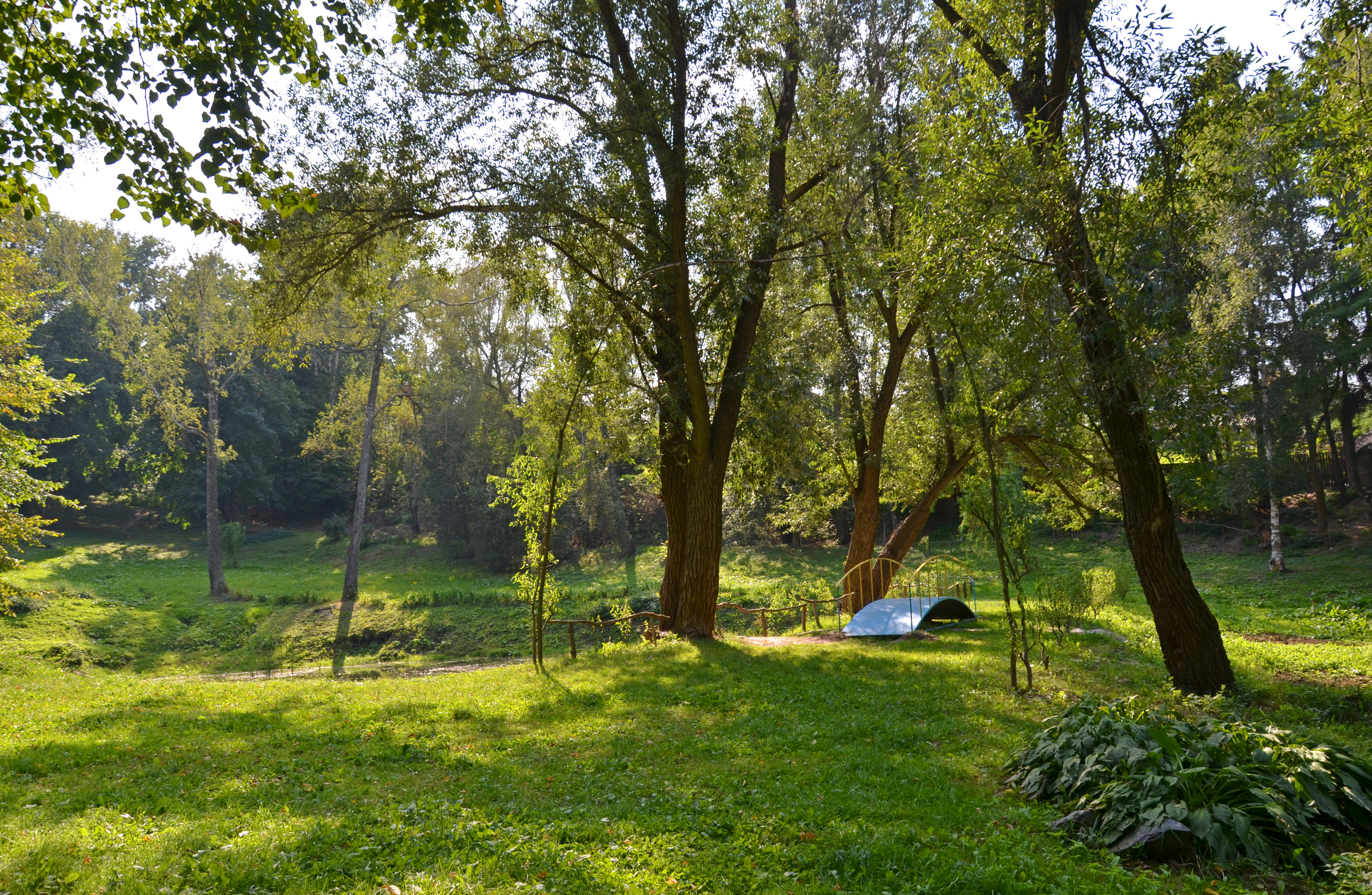 «Молодіжний» парк-пам'ятка садово-паркового мистецтва (14,78 га), Фастів